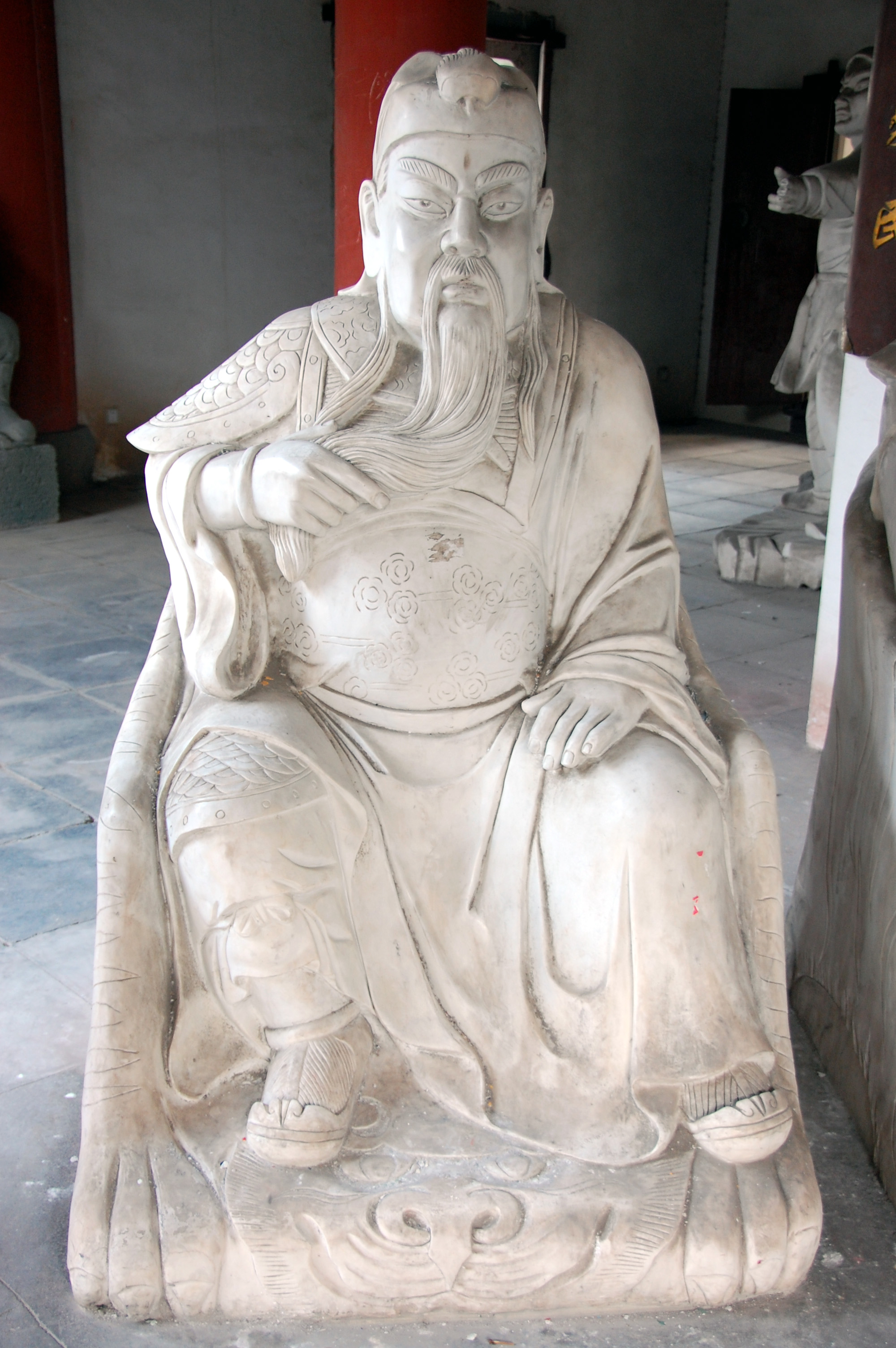 清明上河図/清明上河图